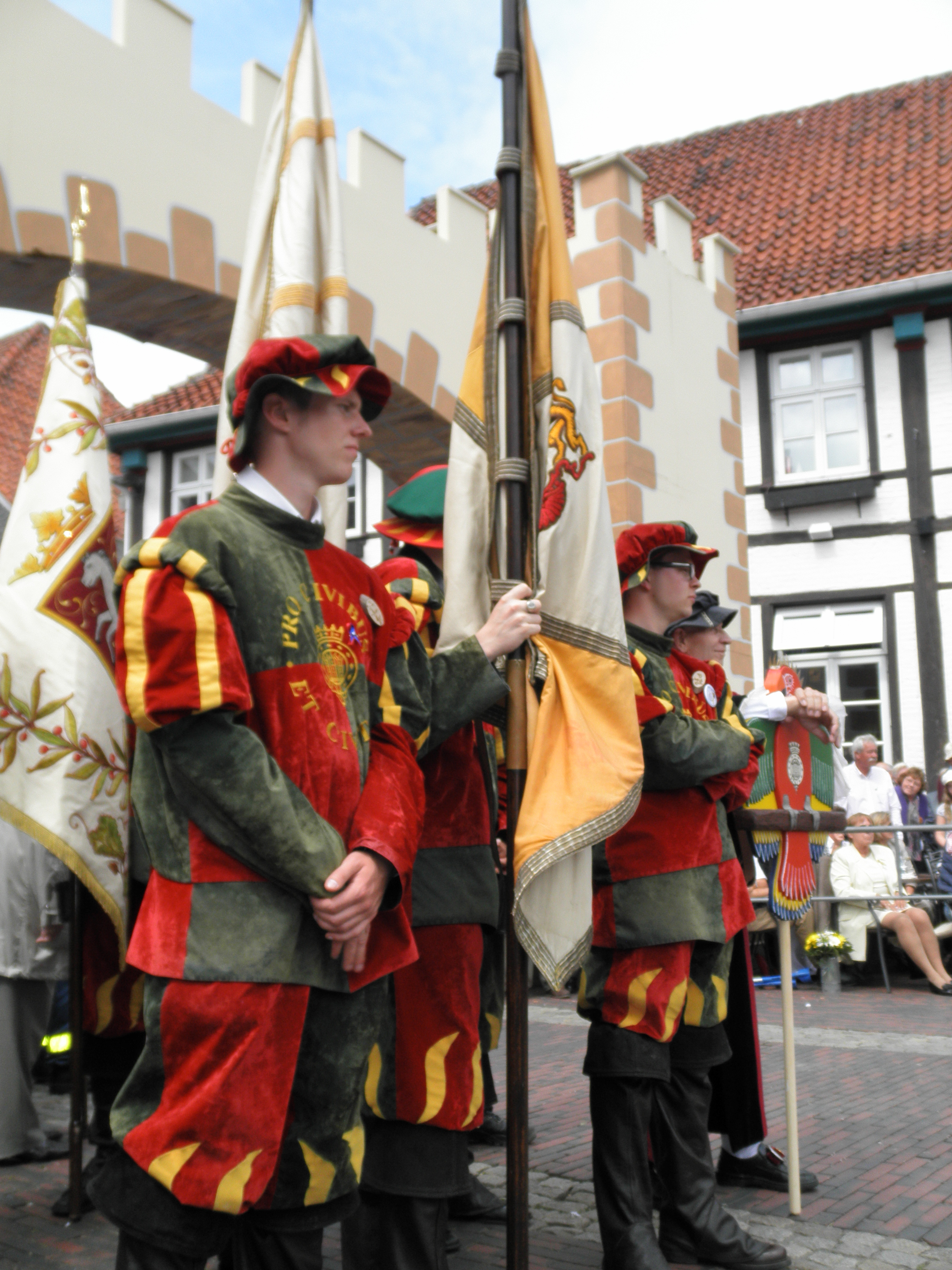 la gvardio atendas en la mezepoka Kivelingsfest 2011 en Lingen (Ems)